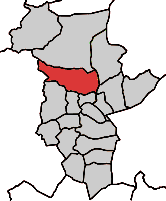 Situación da parroquia de Fanoi no concello de Abadín